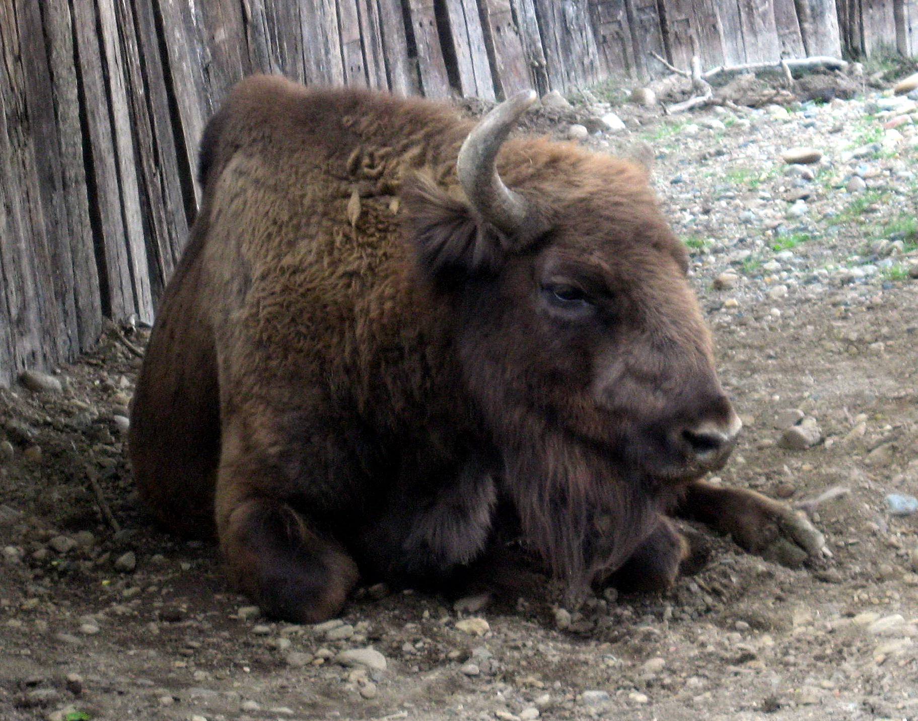 Zubr evropský